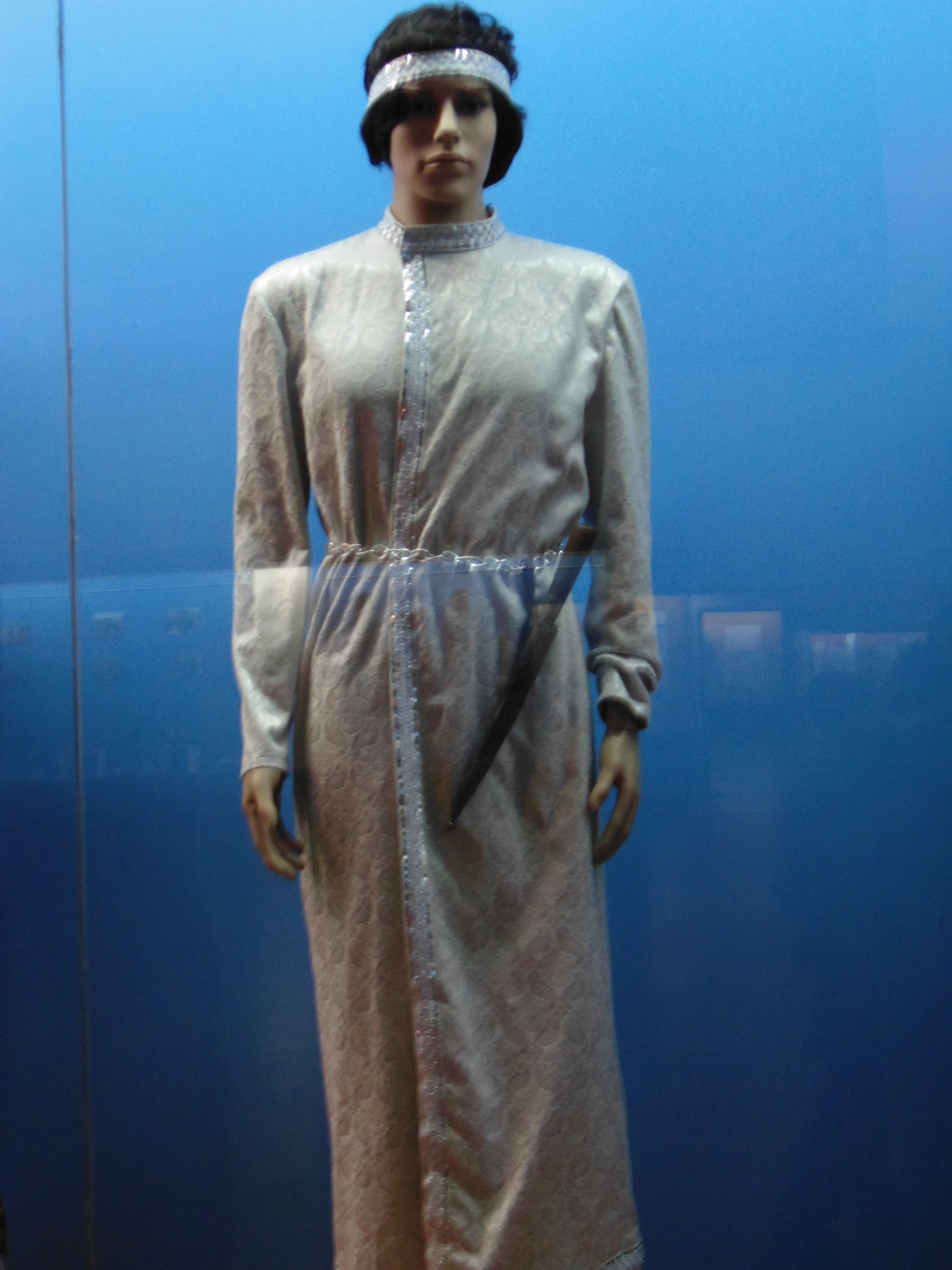 Бактрийская мужская одежда Кафирниган (Таджикистан). Экспонат находится в Национальном музее Таджикистана г Душанбе